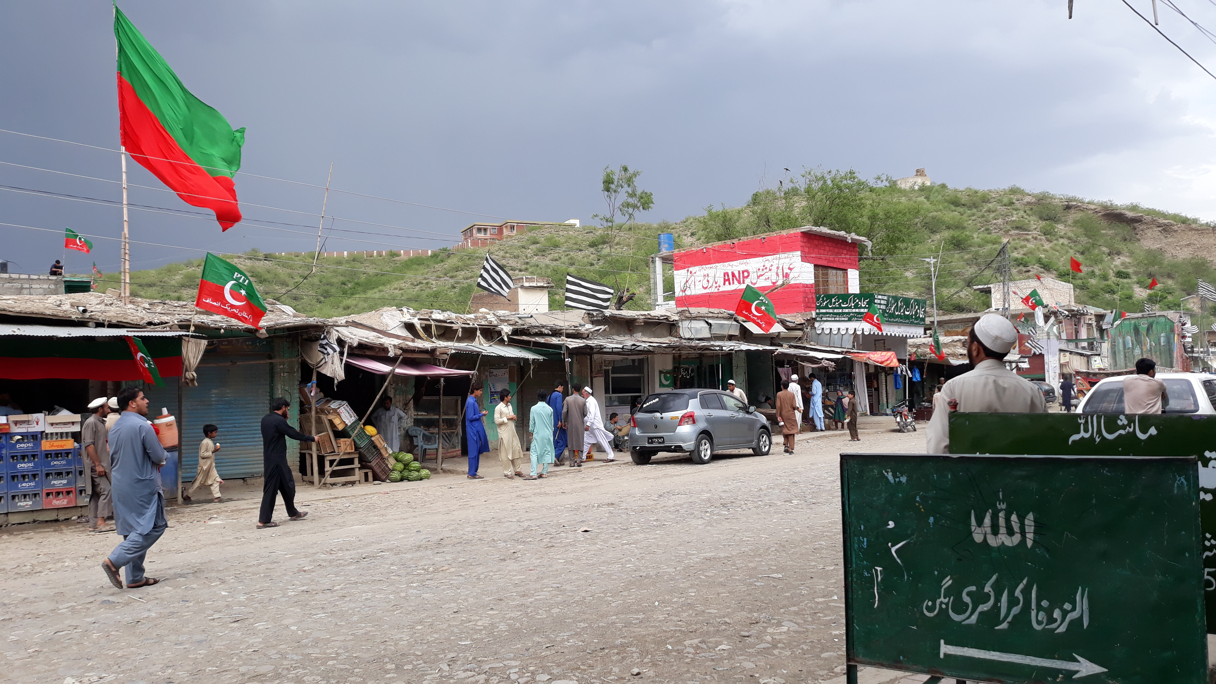 KURRAM AGENCY, BAGAN BAZAAR, PHOTO BY UMAR MUNIR ORAKZAI786